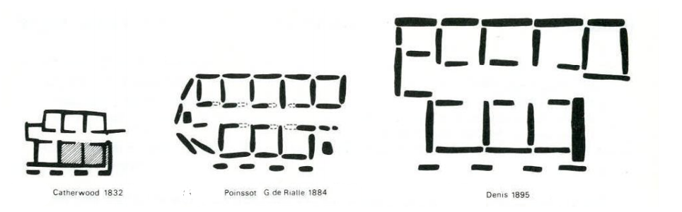 Plans des dolmen d'Ellès selon Poinssot, Catherwood et Denis